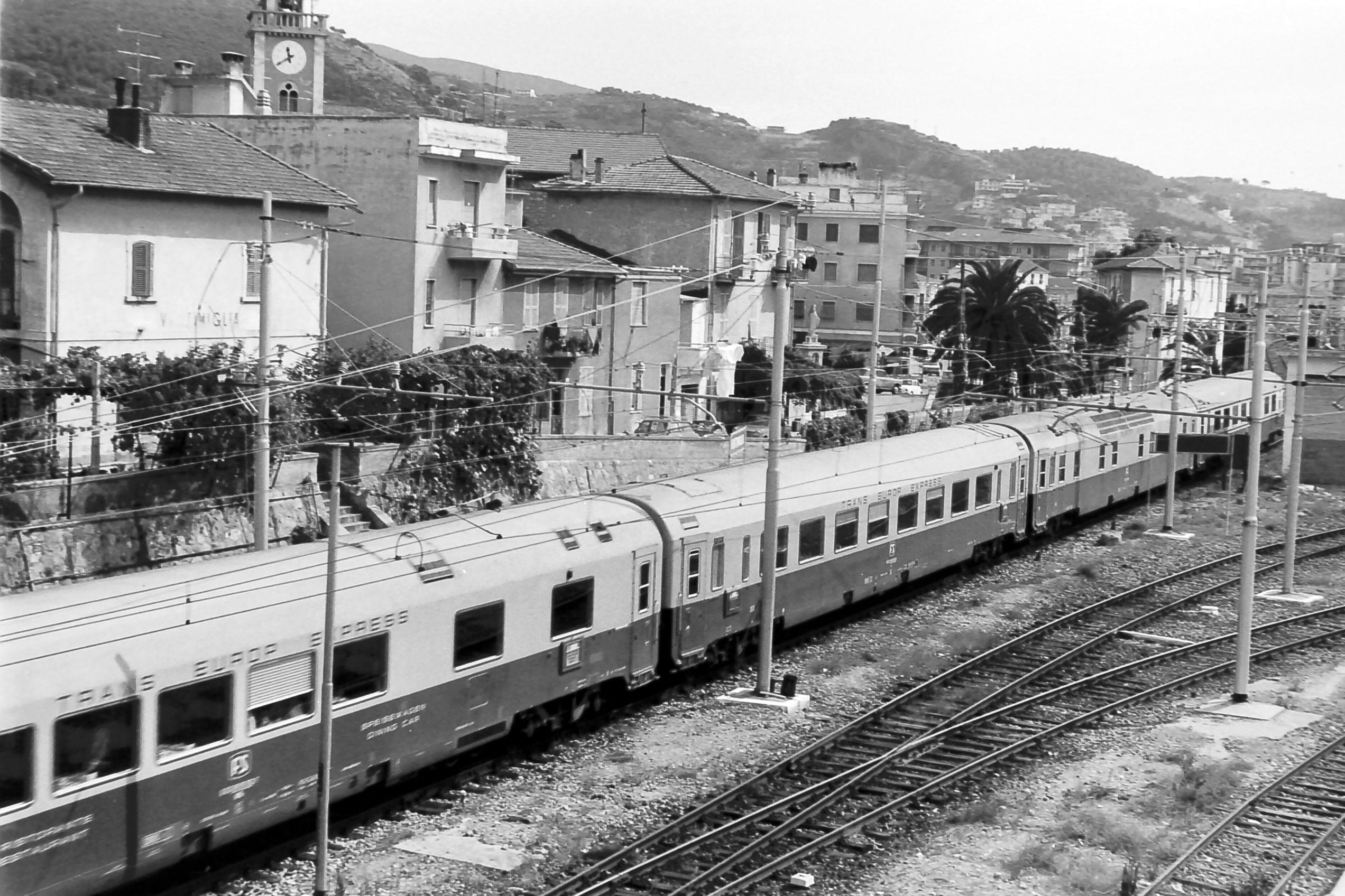 Coda del treno TEE "Ligure" Milano-Avignone in arrivo a Ventimiglia. Si distinguono la carrozza ristorante tipo WRz, una carrozza tipo Az a salone, il furgone generatore tipo Dz e una carrozza FS Gran Confort di rinforzo tra Milano e Ventimiglia.